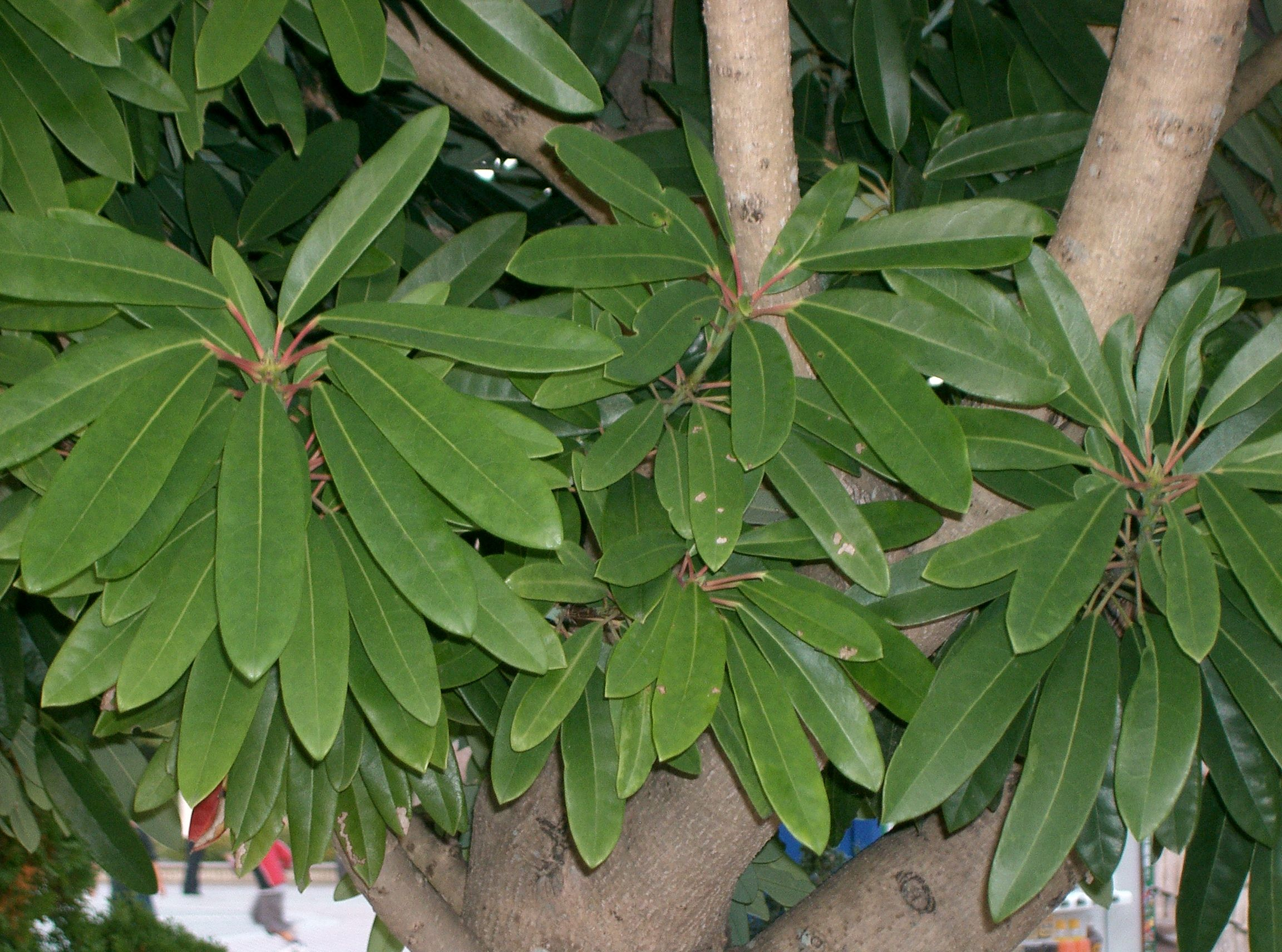 Daphniphyllum teijsmannii(=D. amamiense=D. glaucescens subsp. teijsmannii)